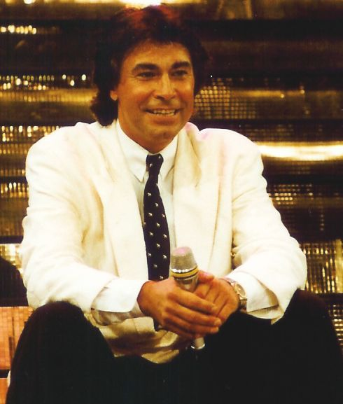 Roy Black, german Schlager-singer